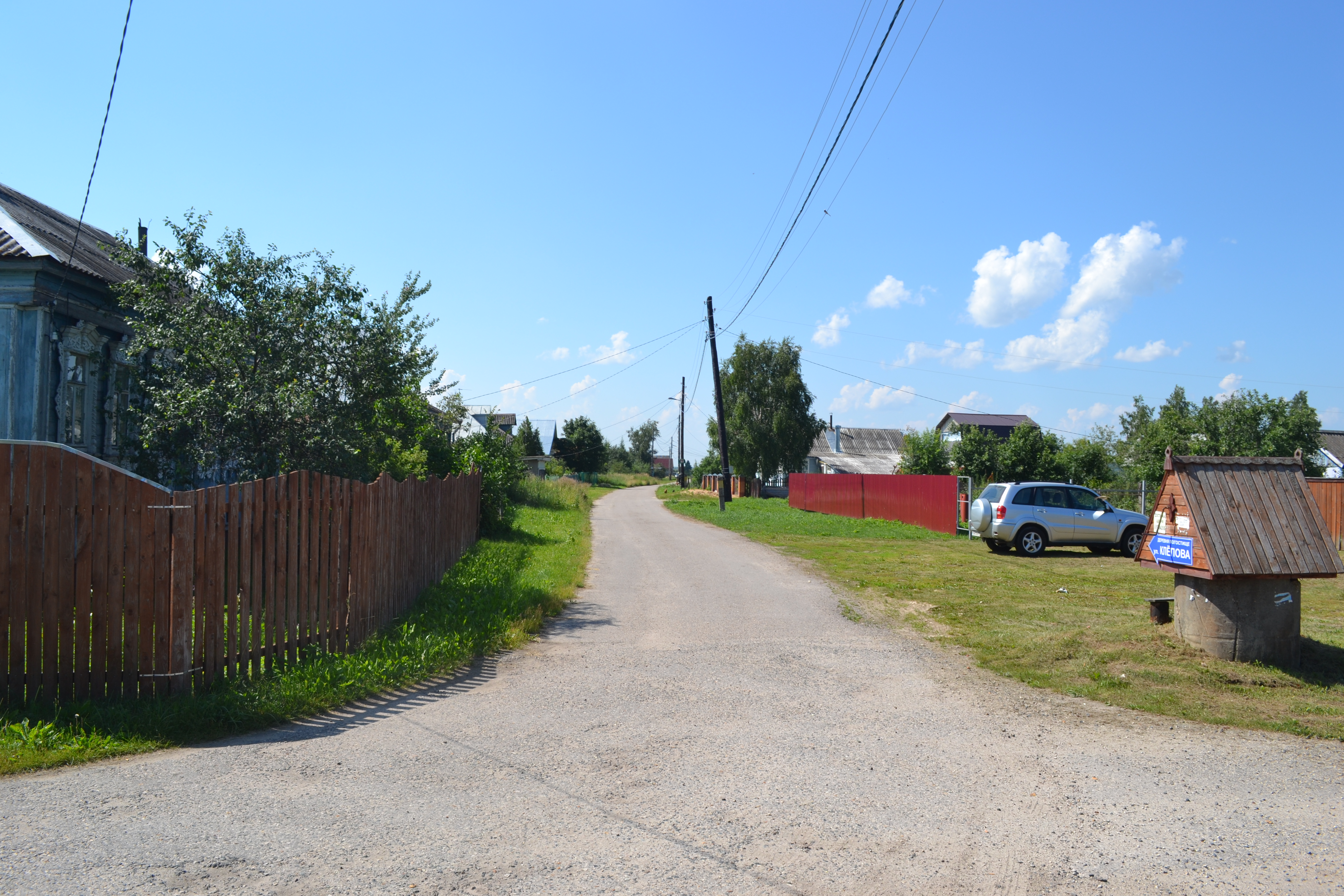 Улица Клёпова в деревне Погостище (Шатурский район)